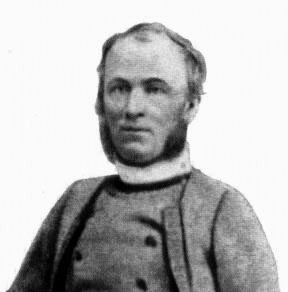 photo de Jean-Marie Deguignet